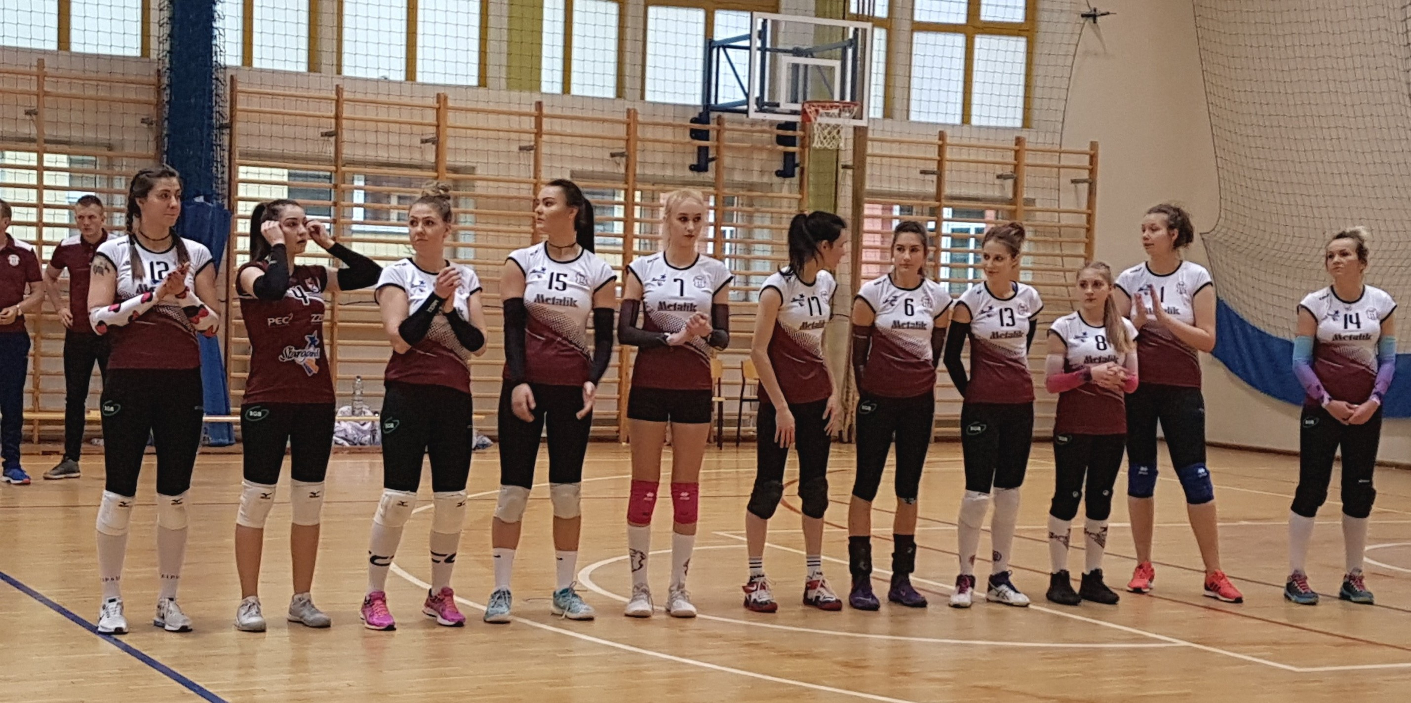 Siatkarki Spójni Stargard